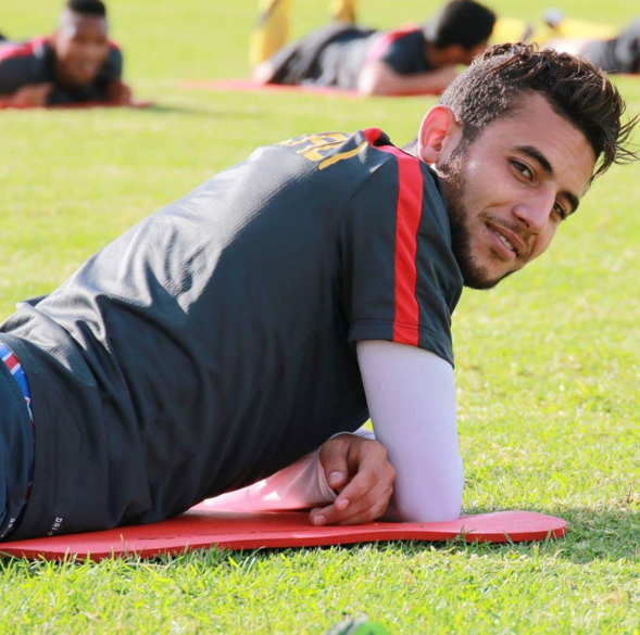 Photo pris dans un entrainement